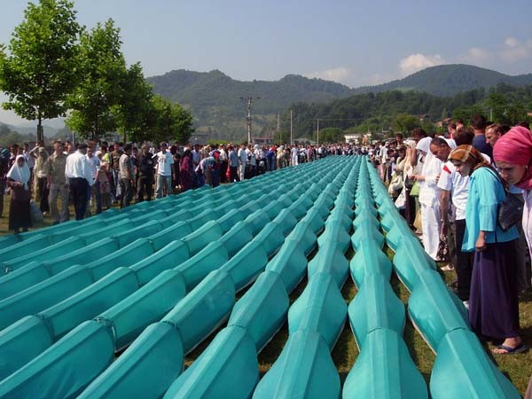 Priprema za dženazu u Potočarima 11. jula 2006. za 505 identifikovanih žrtava genocida. Bild:Potoc2006.jpg Слика:Poto2006.jpg